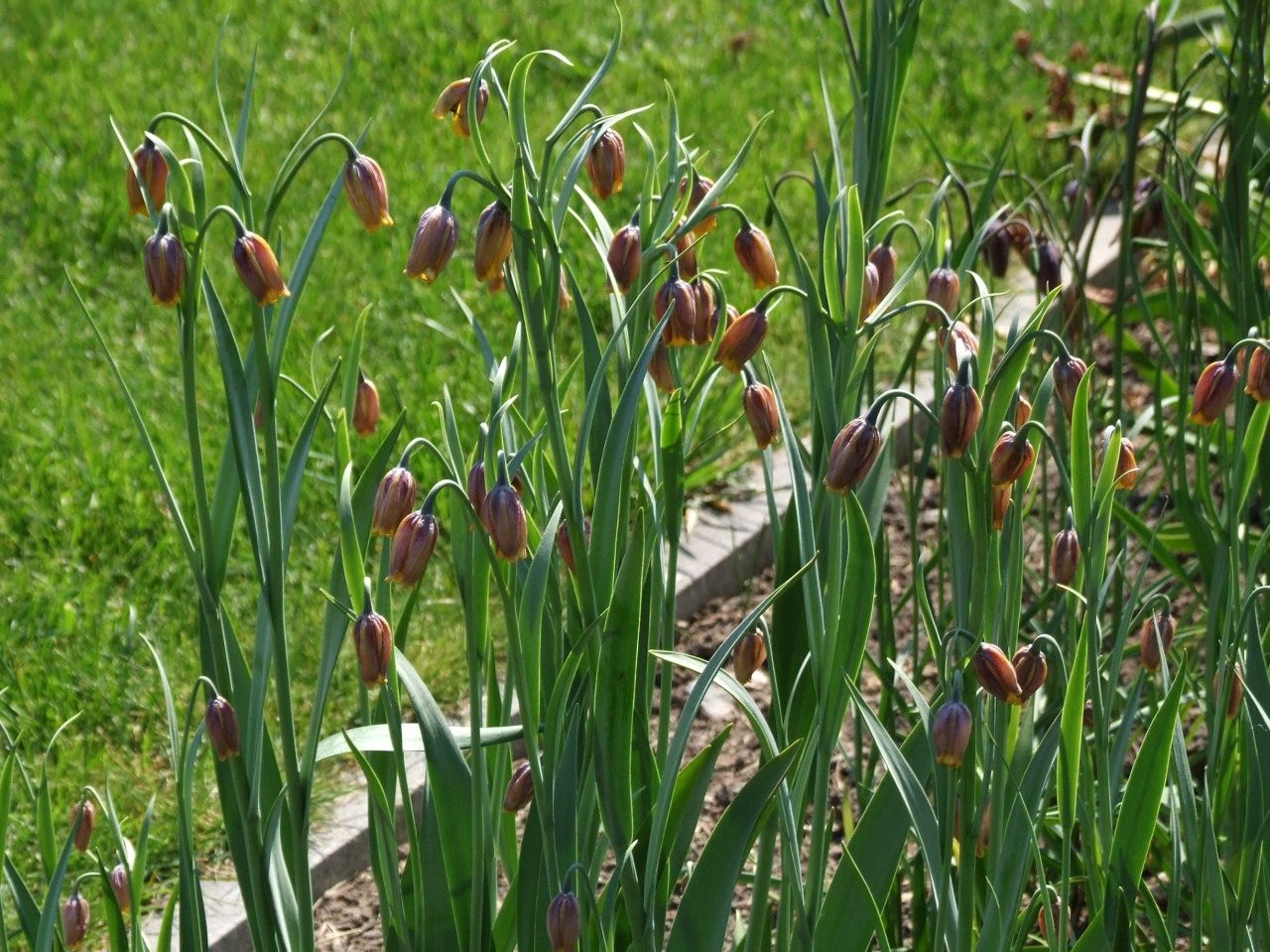 Fritillaria uva-vulpis